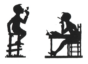 Schimmenspel met het figuurtje 'Jantje van der Plas', ontworpen voor tabaksfabriek Salm. Hiervan maakte Doncker, naast een reclamestripje met losse verzamelplaatjes, een schimmenspel. Kinderen konden de plaatjes uitknippen en hiermee hun eigen schimmenspel maken. De fabrikant was zo enthousiast dat hij grote poppen liet maken (60 cm hoog), die ook konden roken. Doncker hield één voorstelling met Jantje van der Plas, in maart 1917, en stierf kort daarop.